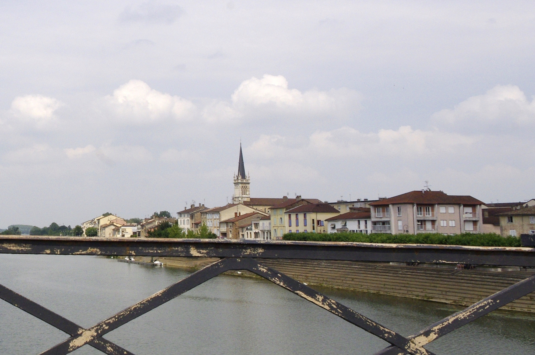 Vue de Saint Laurent sur Saône depuis le pont sur la Saône, France (détail de la photo File:Macon 04.JPG